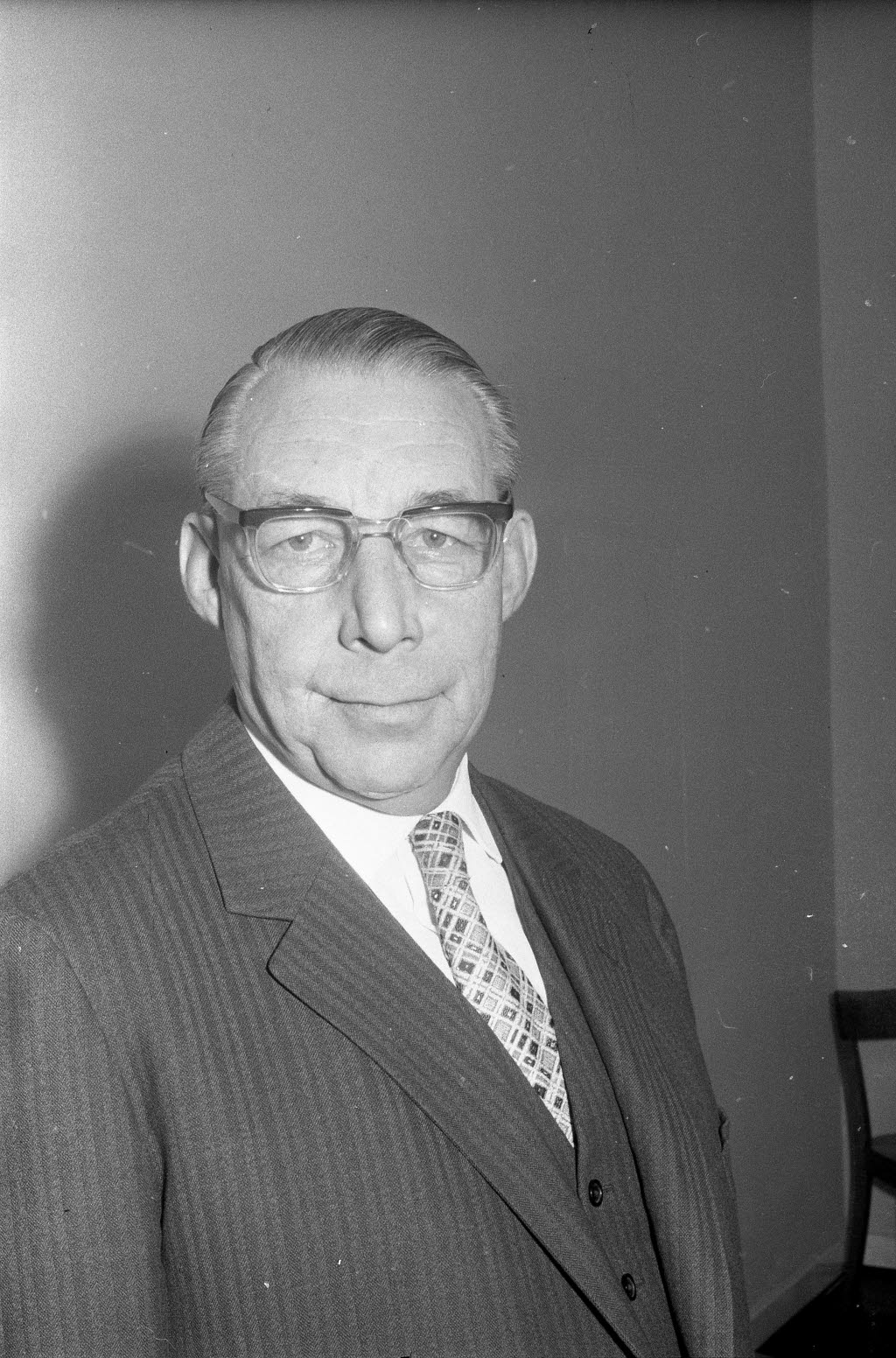 Rektor und Professor für Staats- und Völkerrecht an der Christian-Albrechts-Universität (CAU).